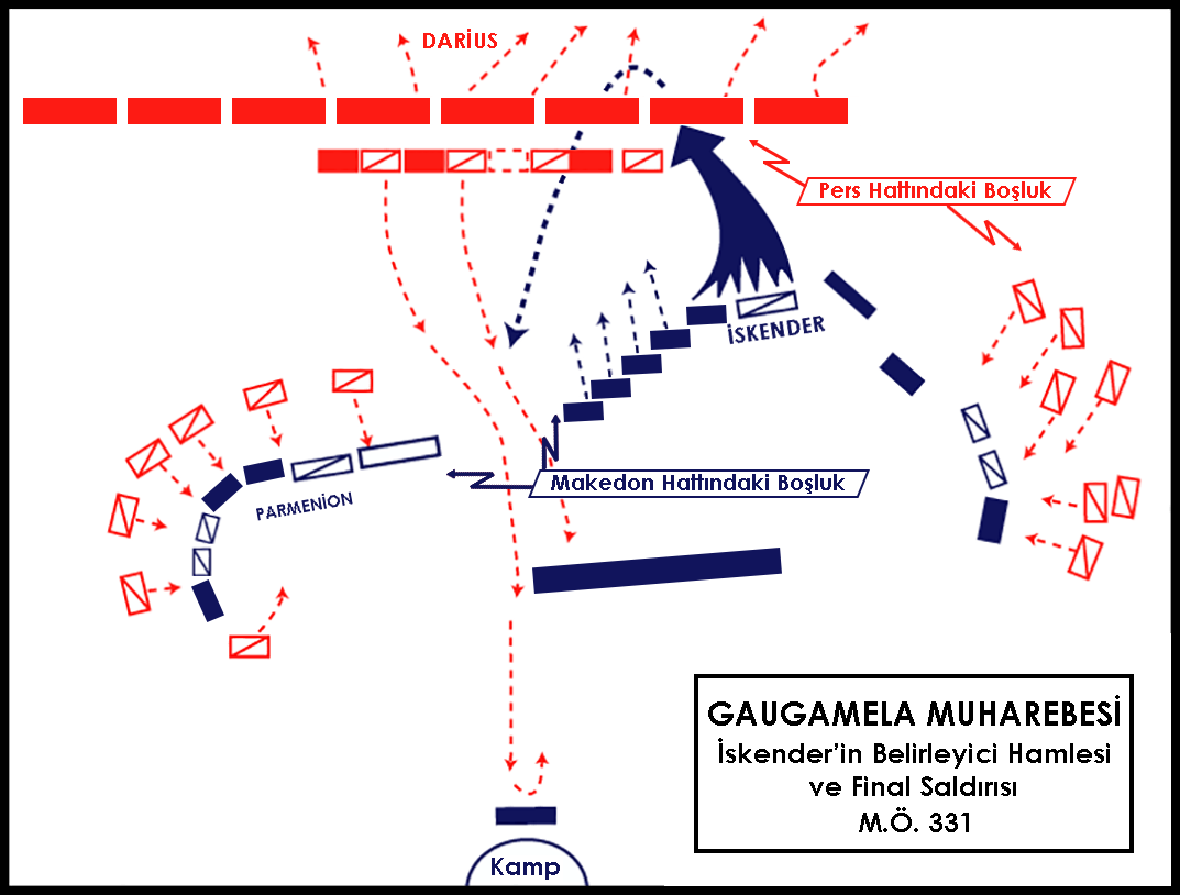 Gaugamela Muharebesi-Makedonlar (İskender) ve Persler (3.Darius)-M.Ö. 331-İskender'in Belirleyici Hamlesi ve Final Saldırısı